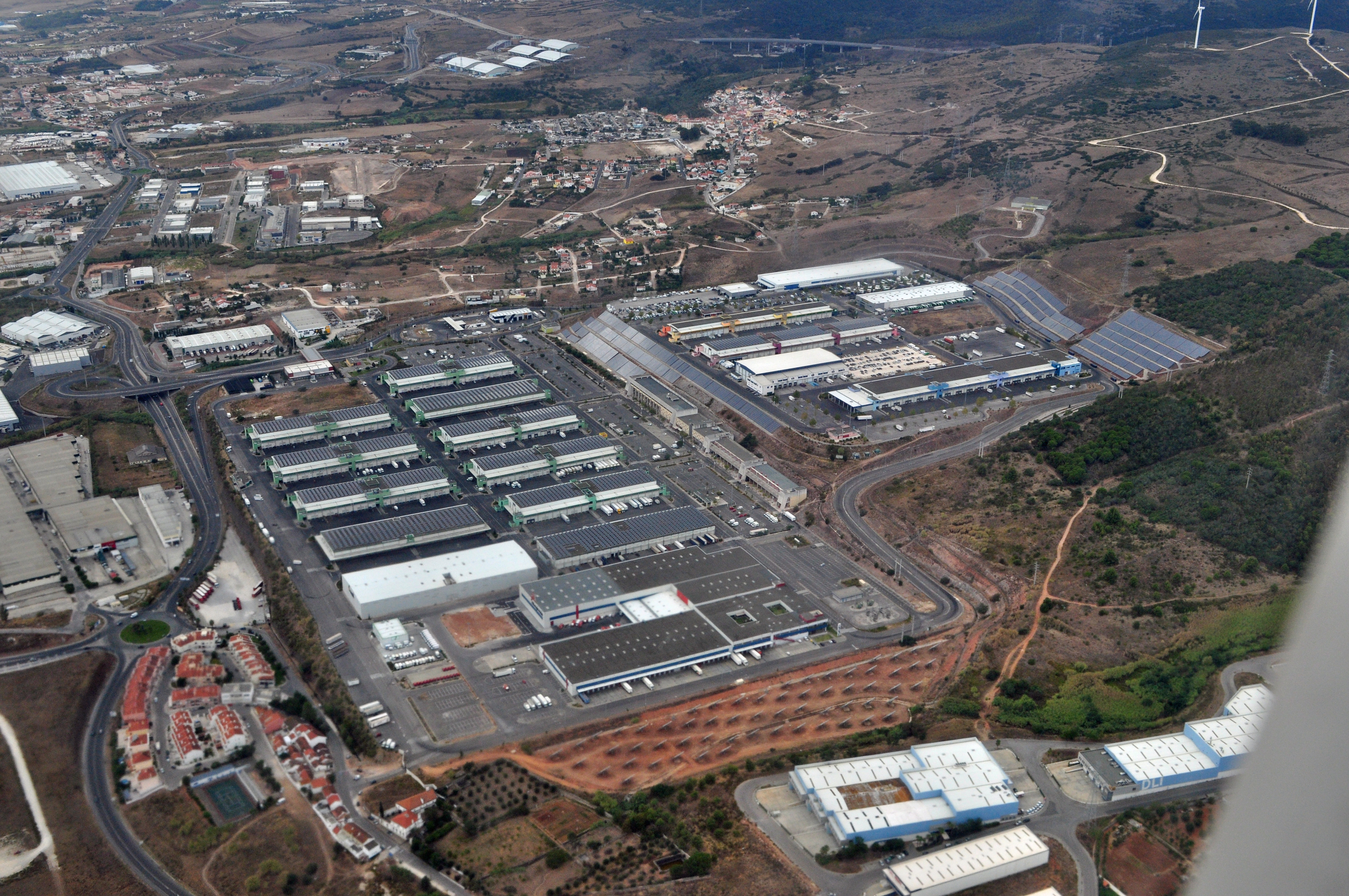 Lissabon aus der Luft beim Anflug (2012-09-22), by Klugschnacker in Wikipedia (1)